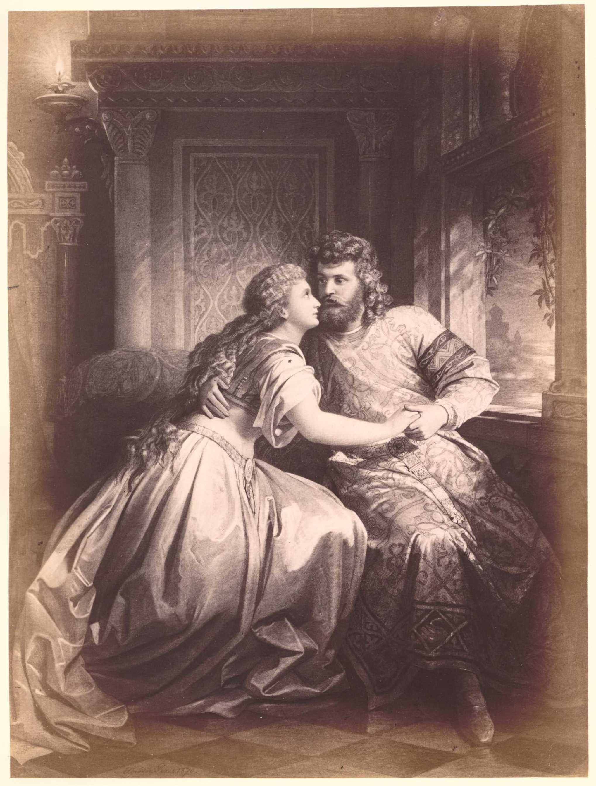 Richard-Wagner-Galerie. Nach den auf allerhöchsten Befehl Sr. Majestät König Ludwig II. von Bayern ausgeführten Cartons von Wilh. von Kaulbach und Theodor Pixis. Photographiert von Jos. Albert. Mit Biographie Richard Wagners und erläuterndem Text von Wilhelm Tappert. Berlin, Verlag von Hanfstaengl’s Nachfolger. Blatt: Elsa und Lohengrin